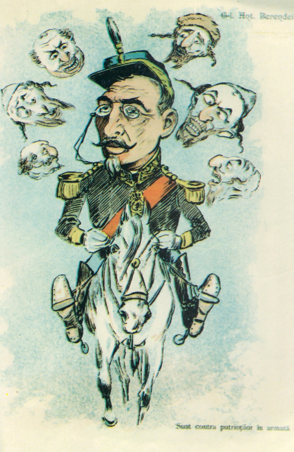 Anton Berindei (caricatură din Albumul Contemporani). Sunt contra patrioților în armată